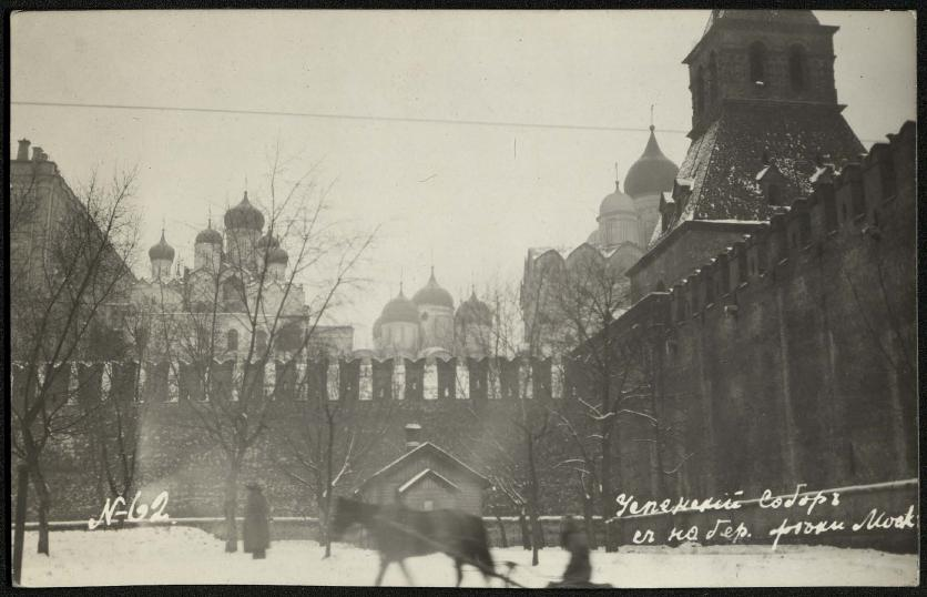 Успенский собор с набережной реки Москвы